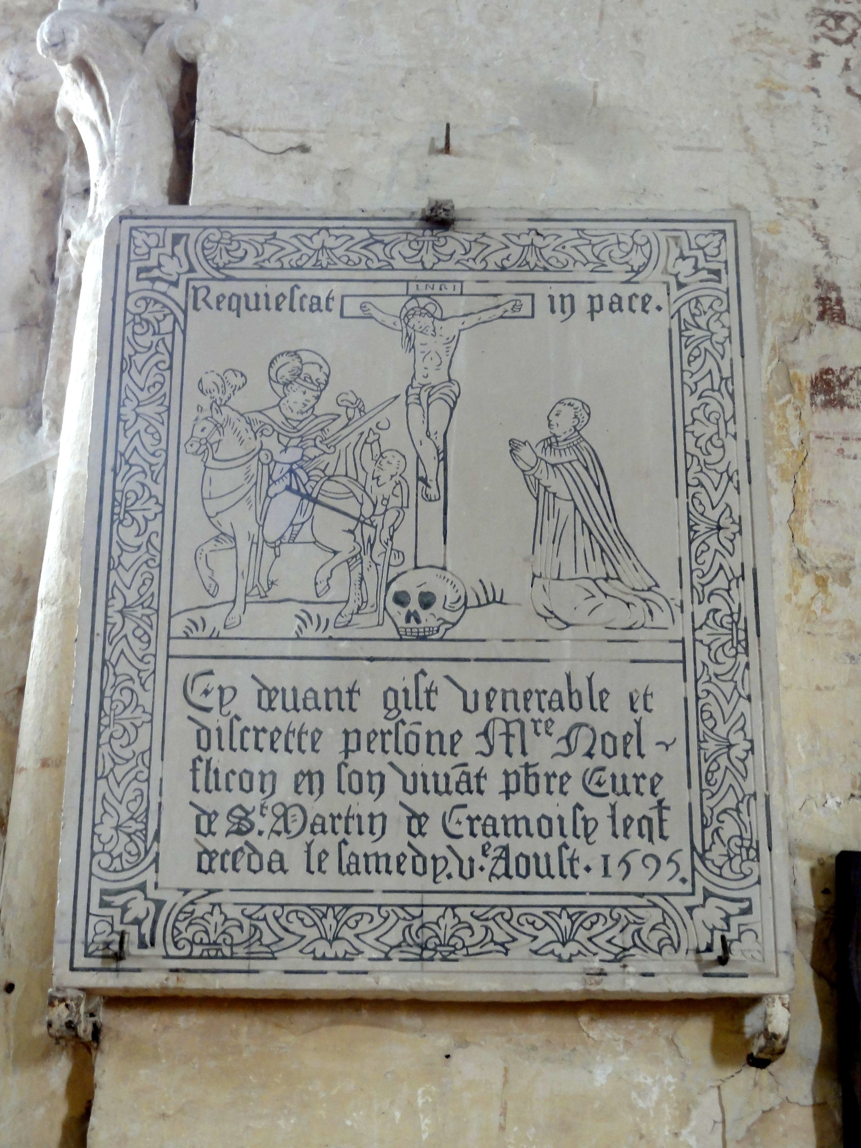 Dalle funéraire d'un curé de Cramoisy, datant de 1595.